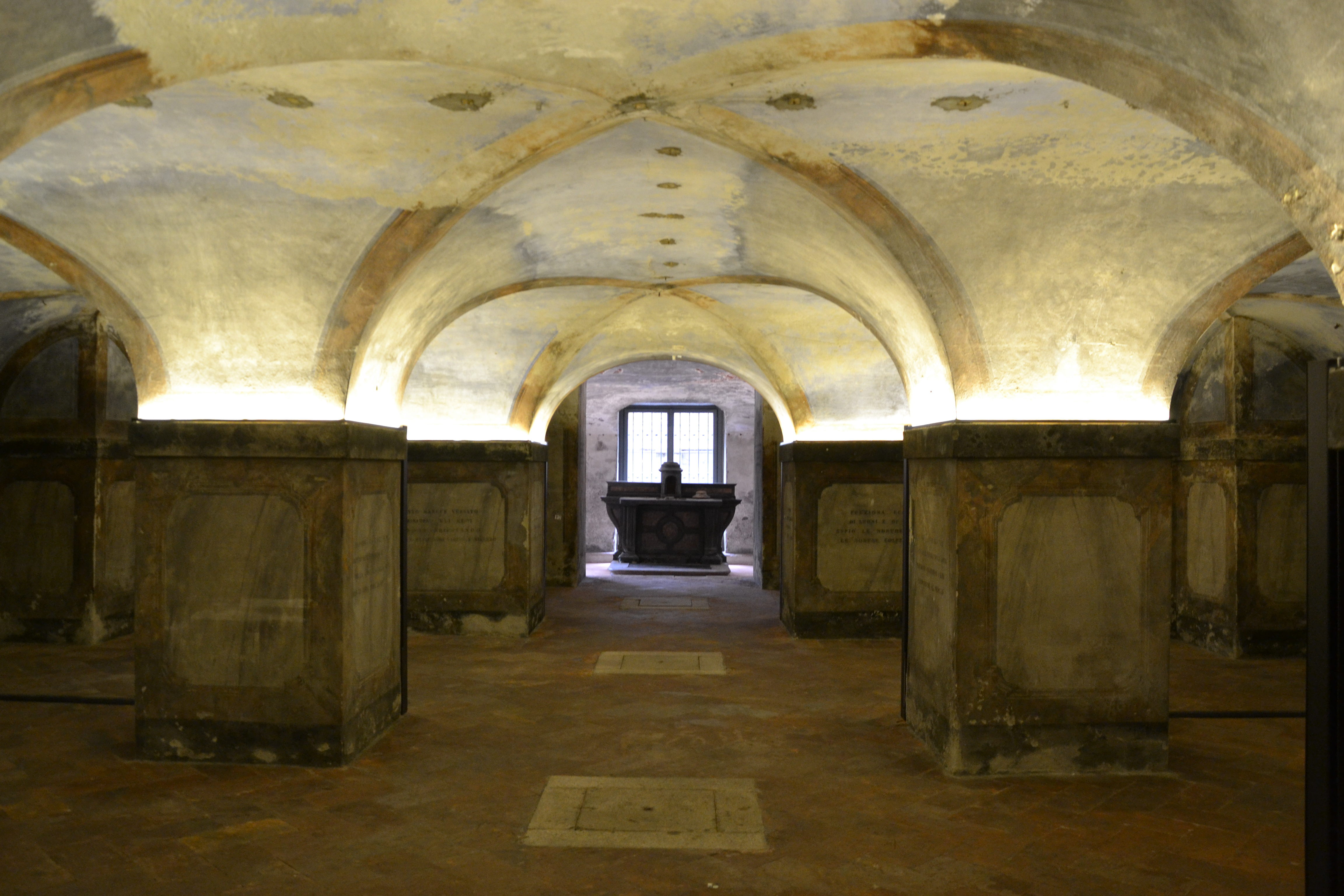 Milano - Università Statale, S. Maria Annunciata, cripta